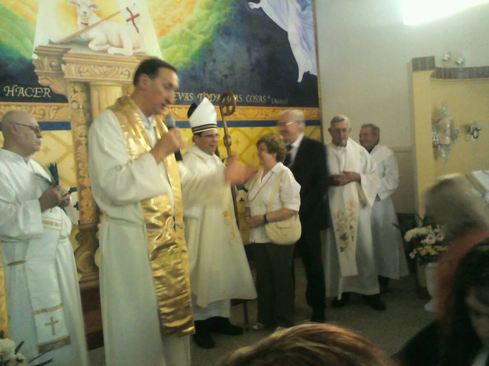 bendicion del mural la trinidad divina